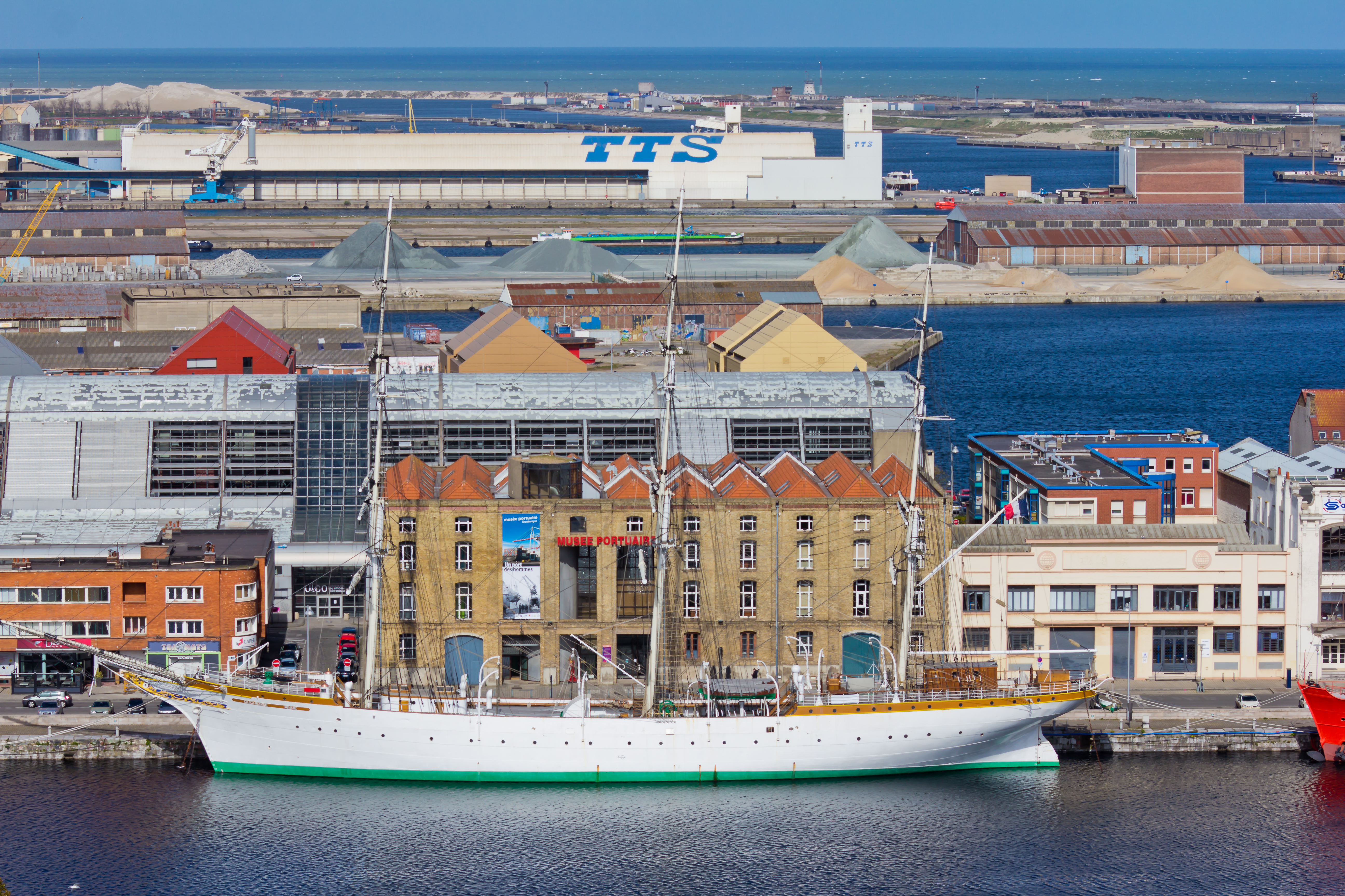 Musée portuaire de Dunkerque - trois-mâts carré Duchesse Anne; Musée Portuaire Dunkerque